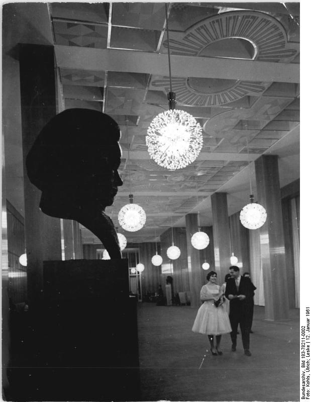 Leipzig, Opernhaus, Parkettfoyer Zentralbild Kohls-Leske Hein-Gi 13.1.1961 Neue Leipziger Oper - Eines der modernsten Bühnenhäuser Europas Eines der modernsten Bühnenhäuser Europas ist die neue Leipziger Oper, die am 8. Oktober ihre erste Premiere mit Ludwig van Beethovens "Fidelio" erlebte. Etwa 8400 Bauarbeiter und Werktätige schufen die neue Oper, in der jedem der 1700 Zuschauer beste Sicht- und Hörverhältnisse geboten werden. Hervorzuheben ist die ausgezeichnete Akustik. Das Opernhaus hat die günstige Nachhallzeit von 1,6 Sekunden bei ausgeglichener Nachhallkurve und sehr guter Sprachverständlichkeit. Die Spielbühne des neuen Hauses is mit 900² die größte der Deutschen Demokratischen Republik. Die eingebaute Drehbühne, die 18 Meter im Durchmesser mißt, ist kombiniert mit einer hinteren und zwei seitlichen Schiebebühnen, die eine schnelle Verwandlung des Bühnenbildes ermöglichen. UBz: Das Parkettfoyer